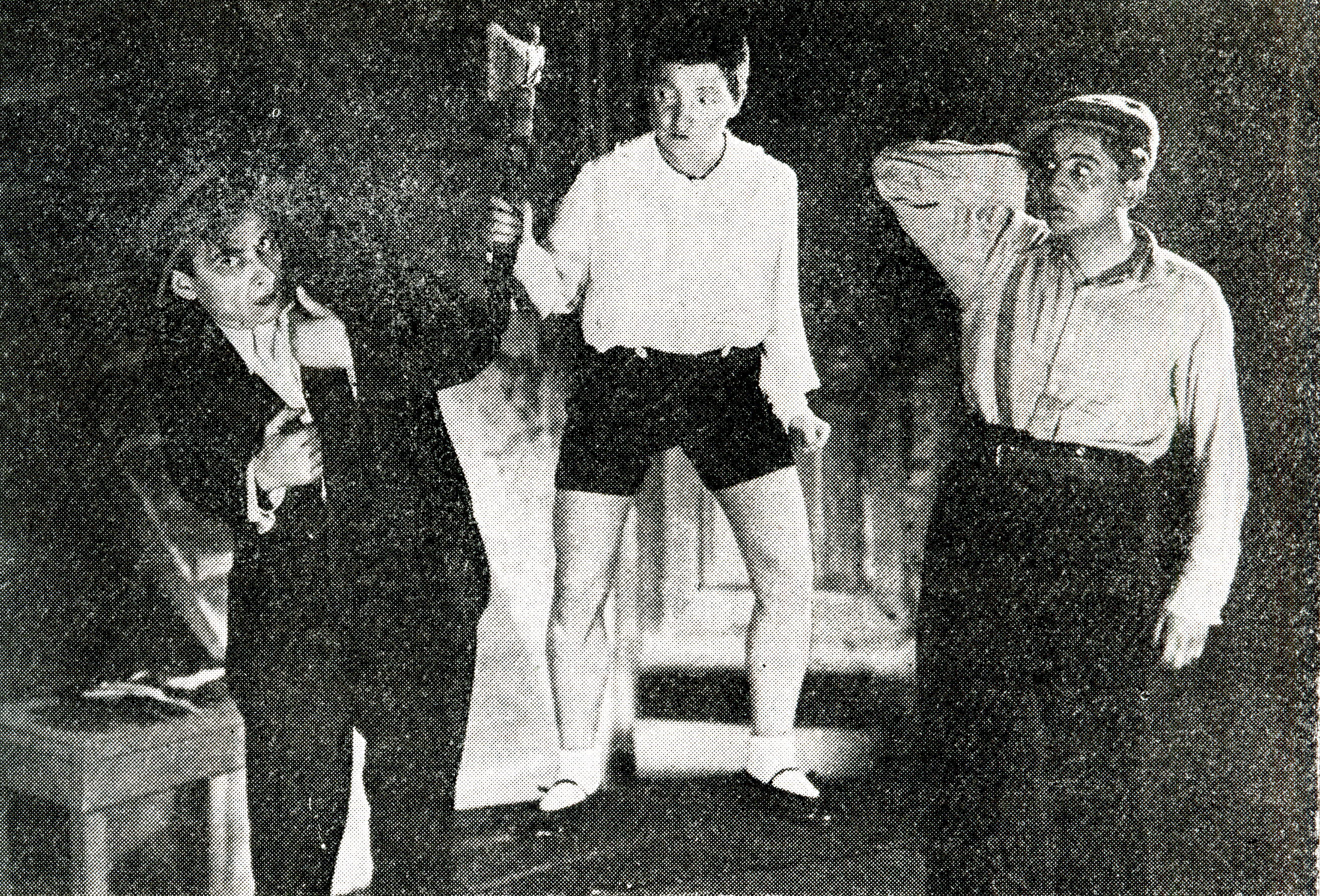 Orchoń, Górska i Pawłowski w skeczu Kidnapping z programu Ogród rozkoszy w teatrze "Cyrulik Warszawski" (1935-1939).